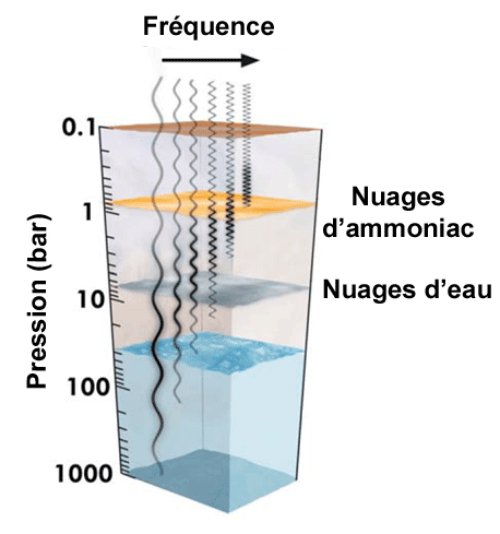 Fonctionnement du radiomètre MWR embarqué à bord de la sonde spatiale Juno